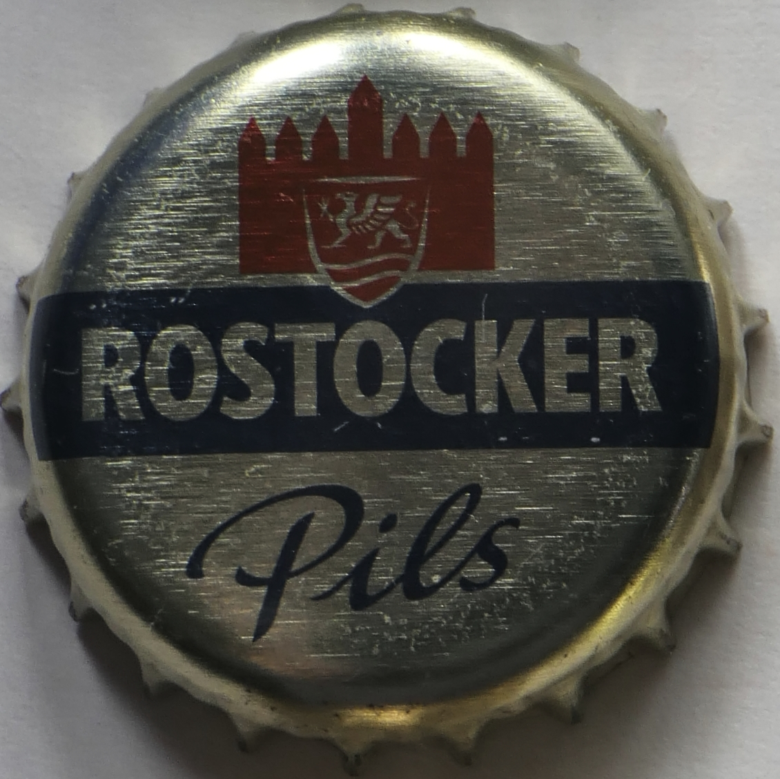 Ein Kronkorken der Hanseatischen Brauerei Rostock, Rostocker Pils, von 2020.